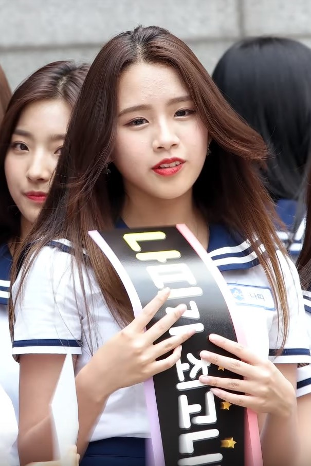 170712 홍대 걷고 싶은 거리 - 아이돌학교 퇴근